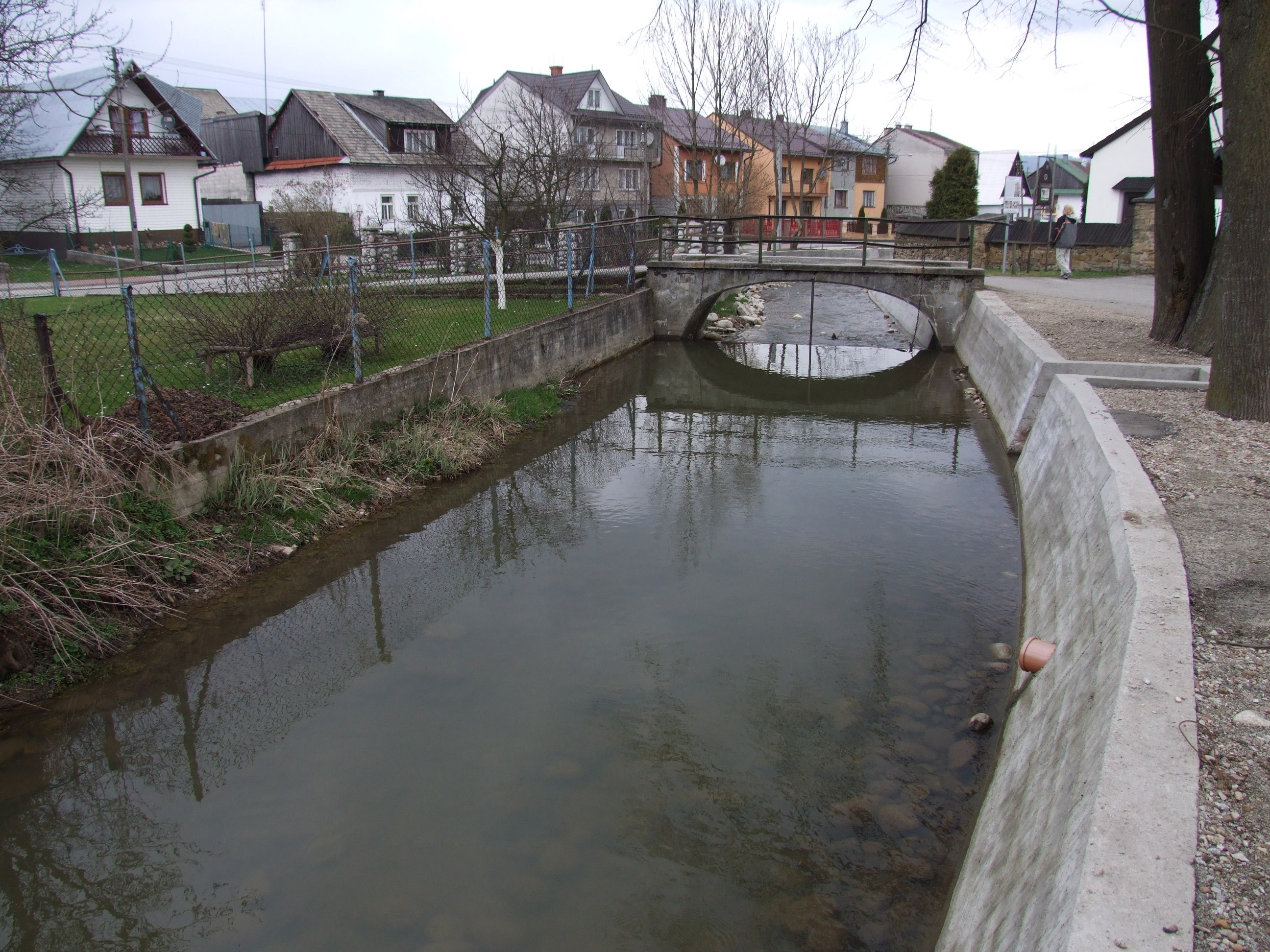 Dursztyński Potok w Krempachach